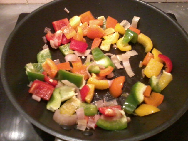 Poivrons rouges, verts, jaunes et oranges coupés en petits morceaux et frits à la poêle avec des oignons.